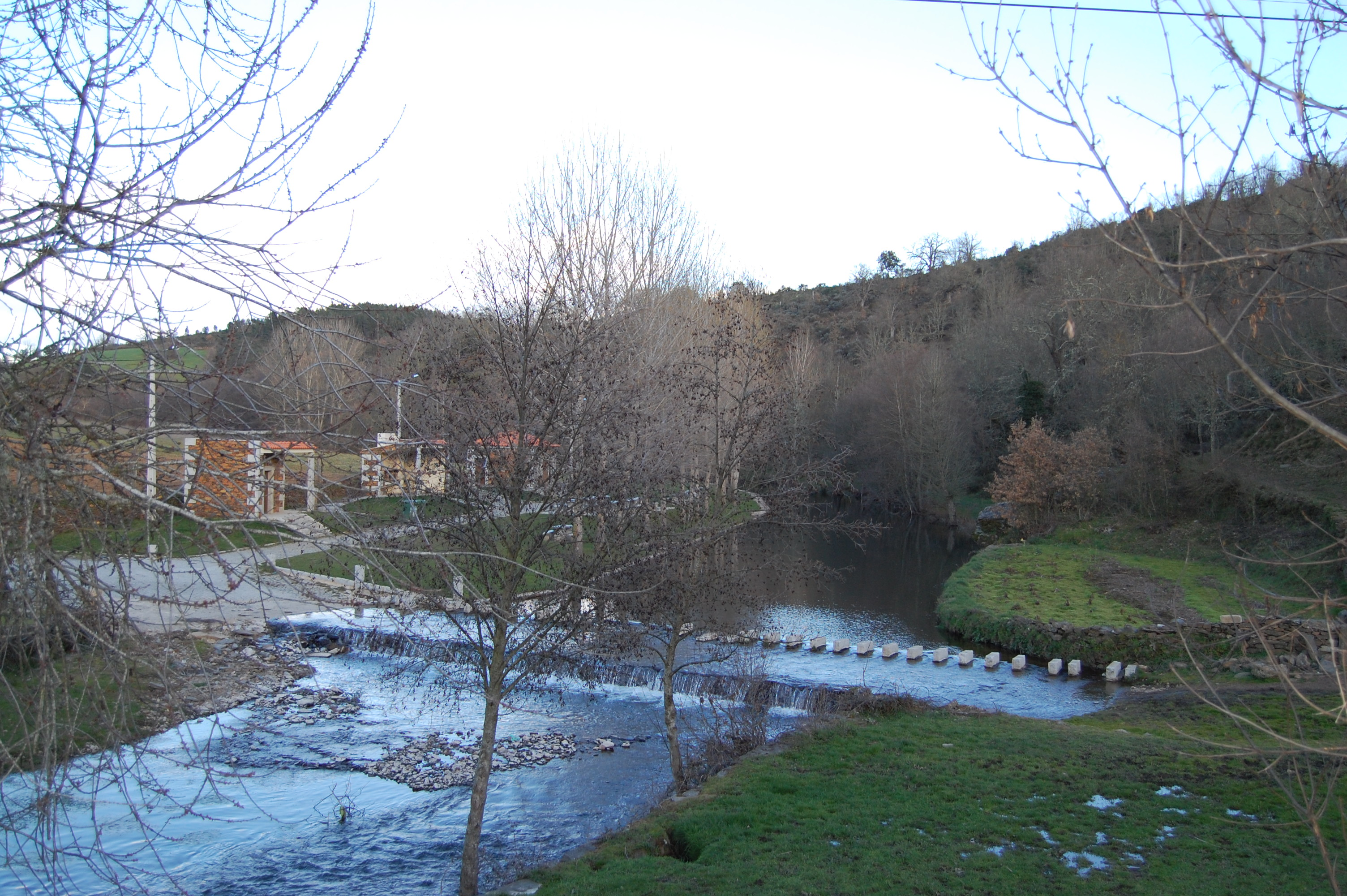 A aldeira de Angueira, concelho de Vimioso, no nordeste de Portugal.